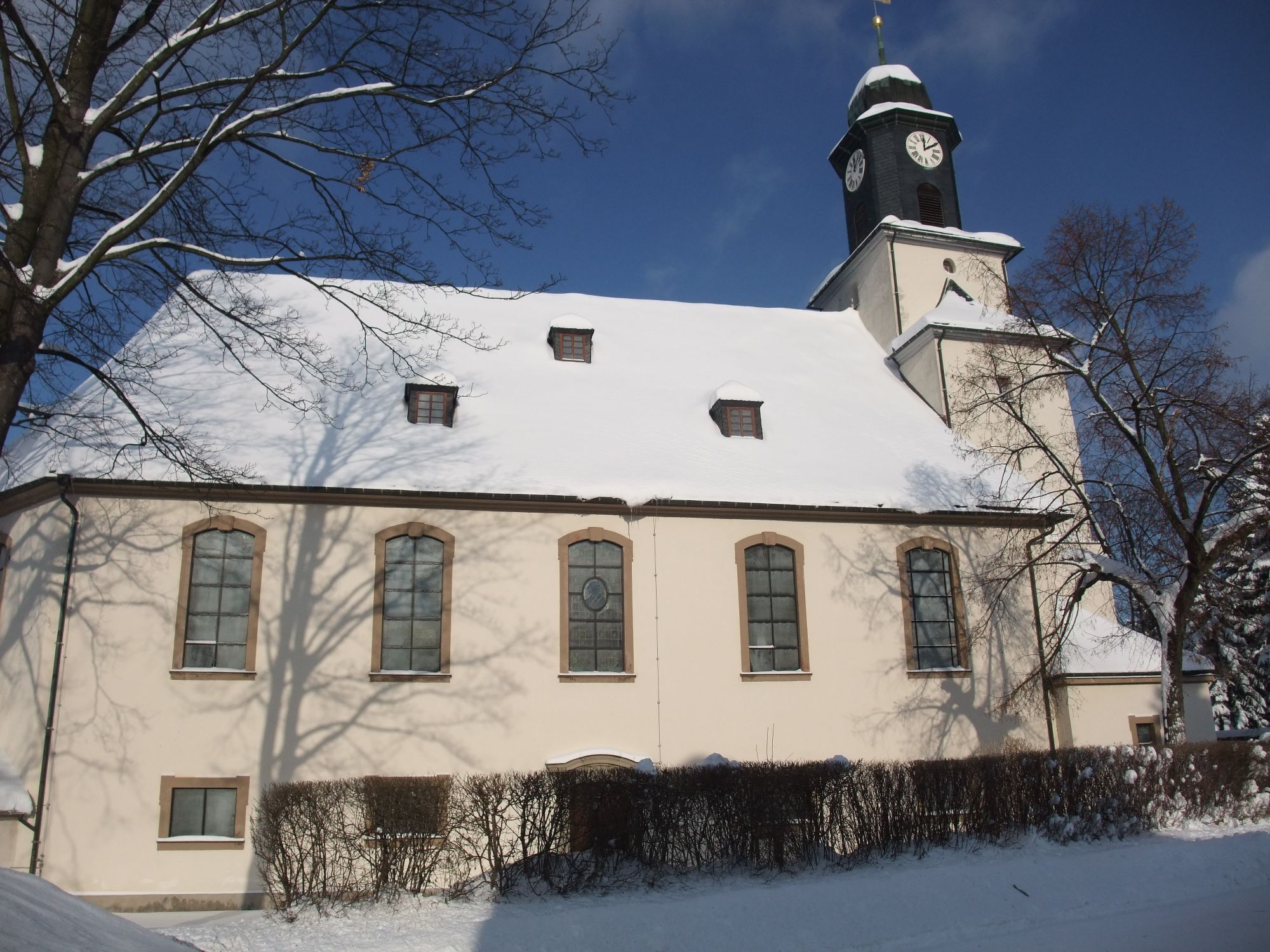 Die Stadtkirche von Zöblitz von Süden gesehen.